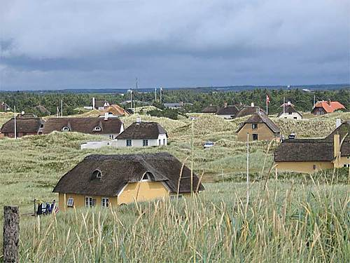 Ferienenhäuser in Vedersø Klit